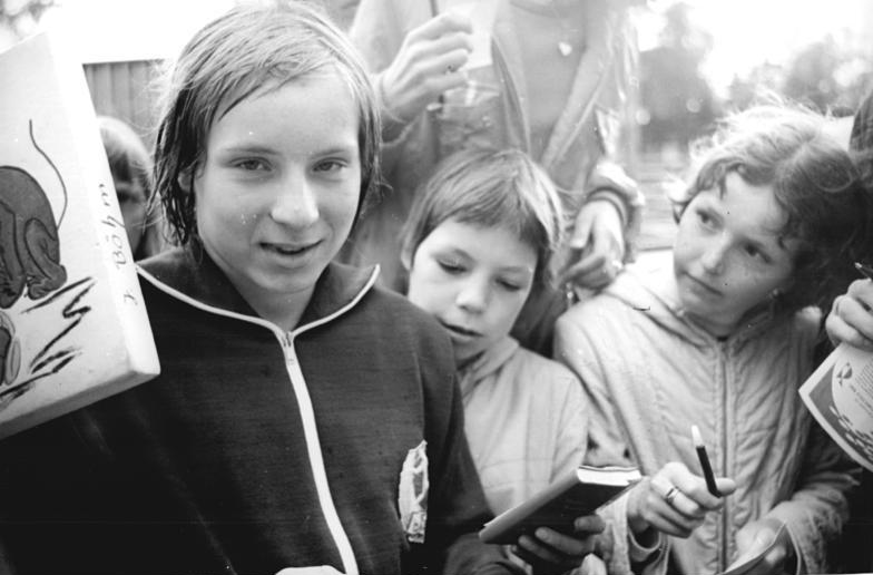 Anne-Katrin Schott ADN-ZB Koch 6-7-74-Rostock: XXV. DDR-Meisterschaften im Schwimmen (3.Tag)-Die 14jährige Anne-Katrin Schott (SC DHfK Leipzig) - hier von Autogrammjägern umringt- steilte mit 2:37,89 min einen neuen Weltrekord über 200 m Brust auf. Sie verbesserte damit auch den besten Weltrekord des Schwimmsports.